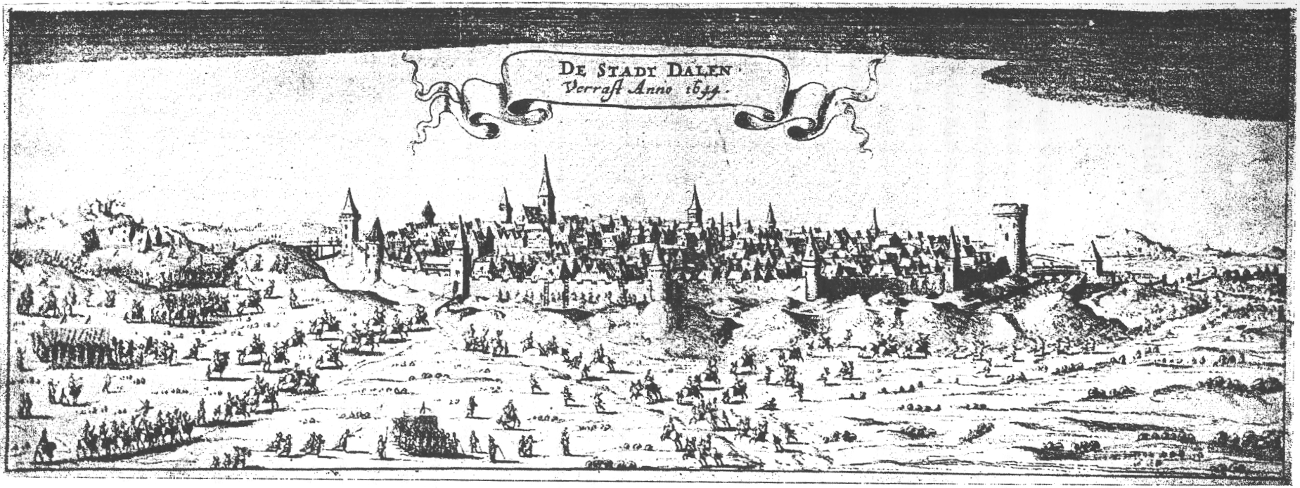 Kupferstich, herausgegeben von Isaac Commelin mit Ortsansicht und Plünderung Dalens durch hessische Truppen am 9. Mai 1644